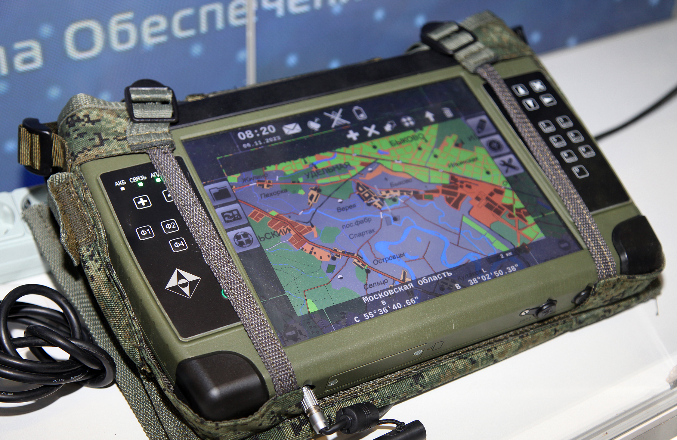 Командирский персональный планшетный компьютер, предназначен для решения задач управления и ориентирования в тактическом звене командного состава (Commander personal tablet PC)